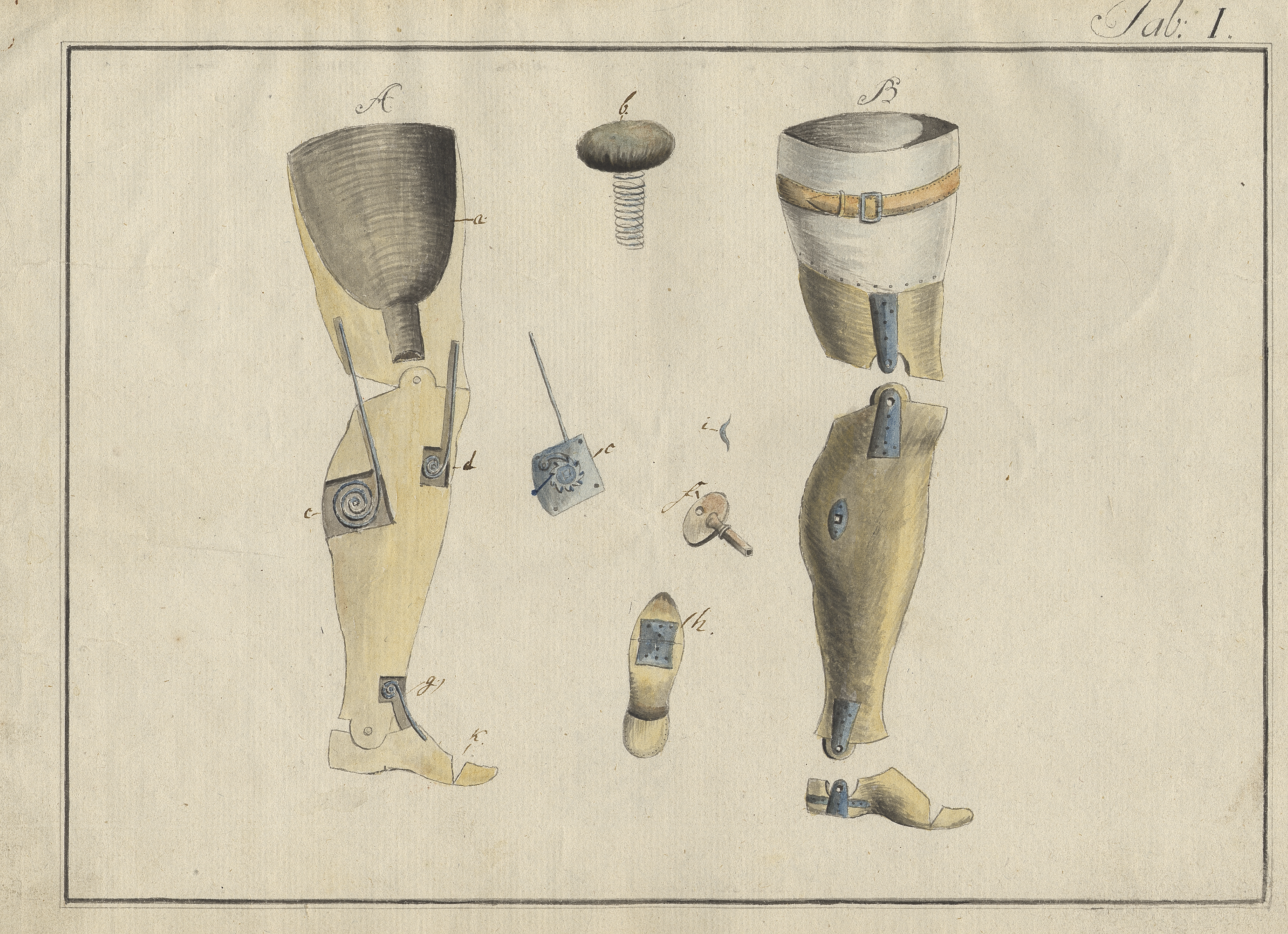 „Künstliche Fußmaschine“, orthopädische Hilfsmittel, Originalzeichnung von Albrecht Ludwig Berblinger, 1809. Stadtarchiv Ulm